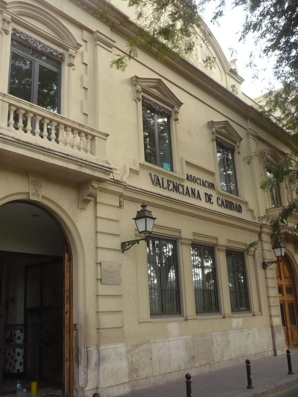 Casa de la Caridad de Valencia, centenaria asociación benéfica.